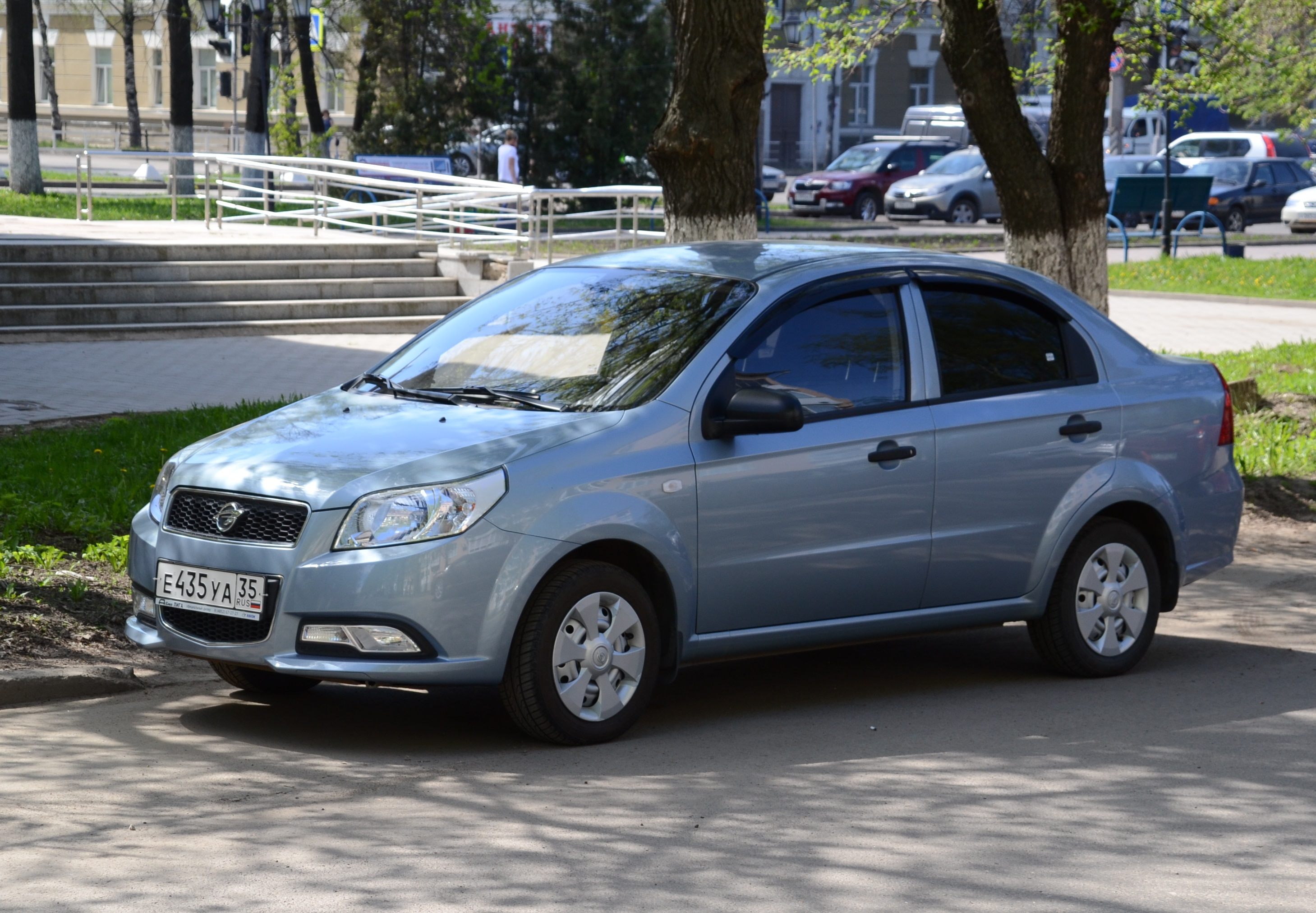 Автомобиль Ravon Nexia R3